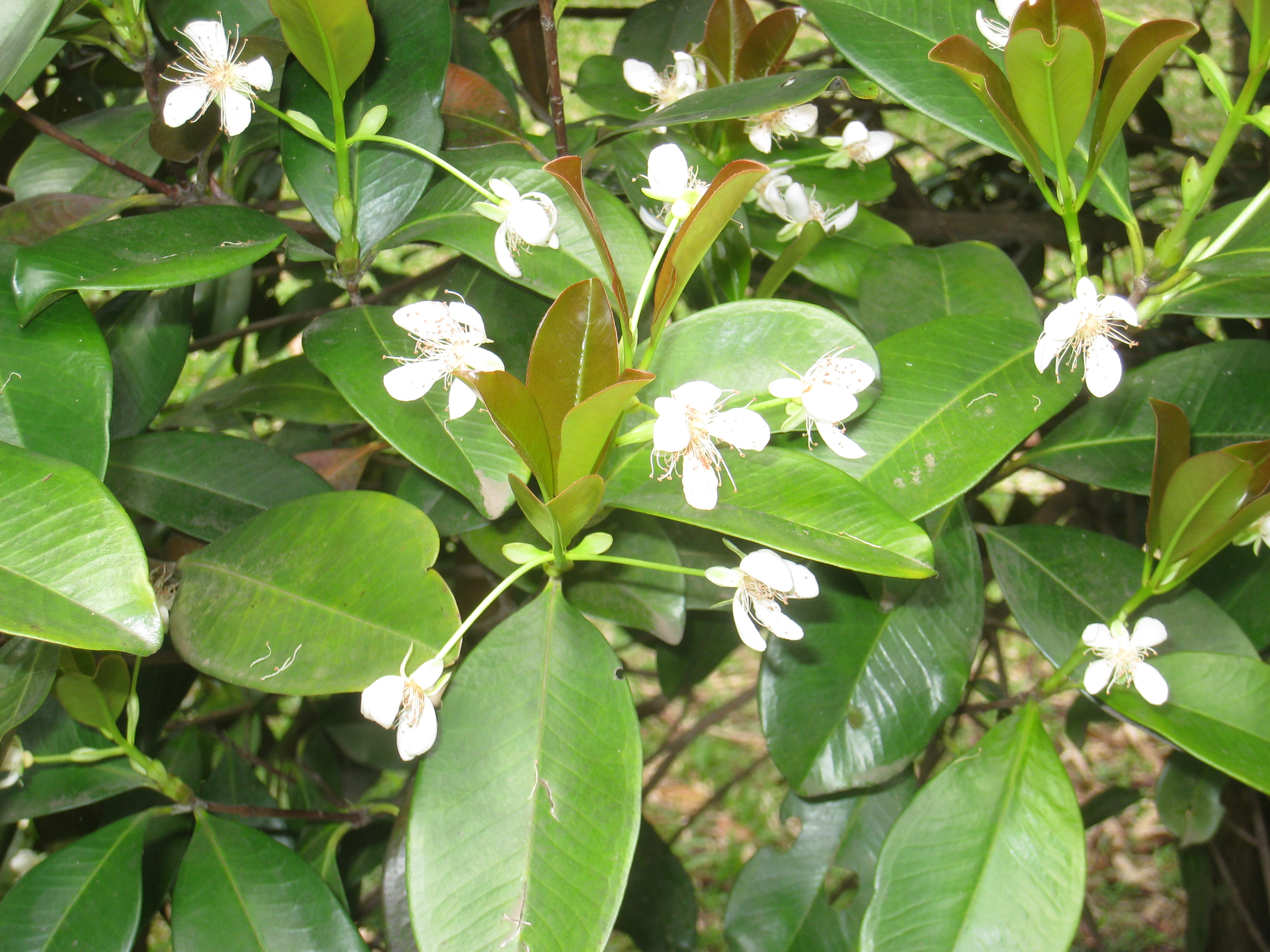 Eugenia brasiliensis in the Jardim Botânico de São Paulo, São Paulo City, SP, Brazil.